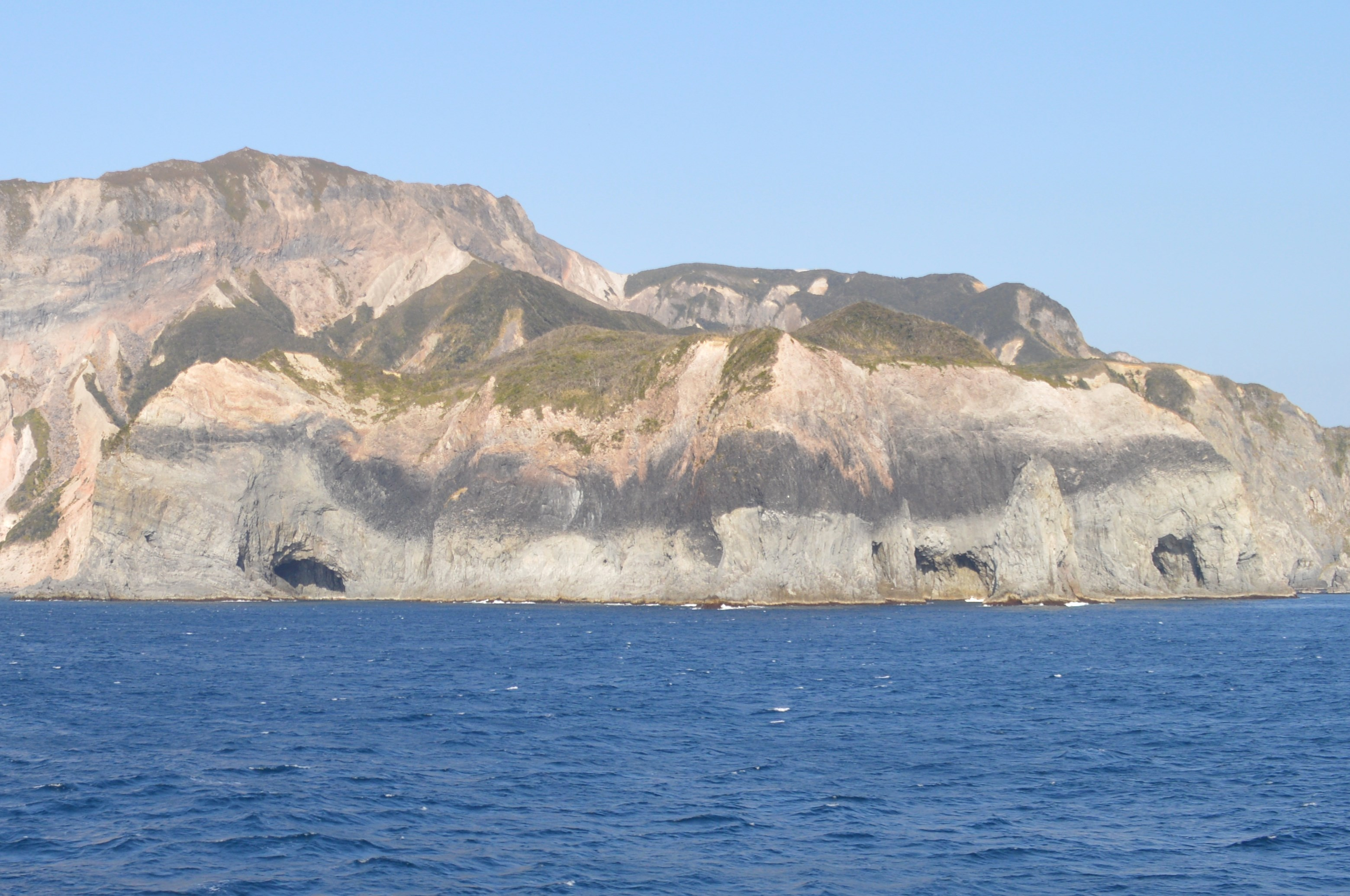 神津島 砂糠山の黒曜石層